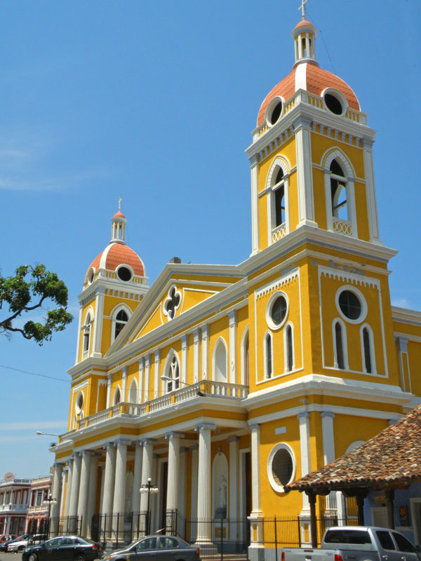 Granada, Nicaragua